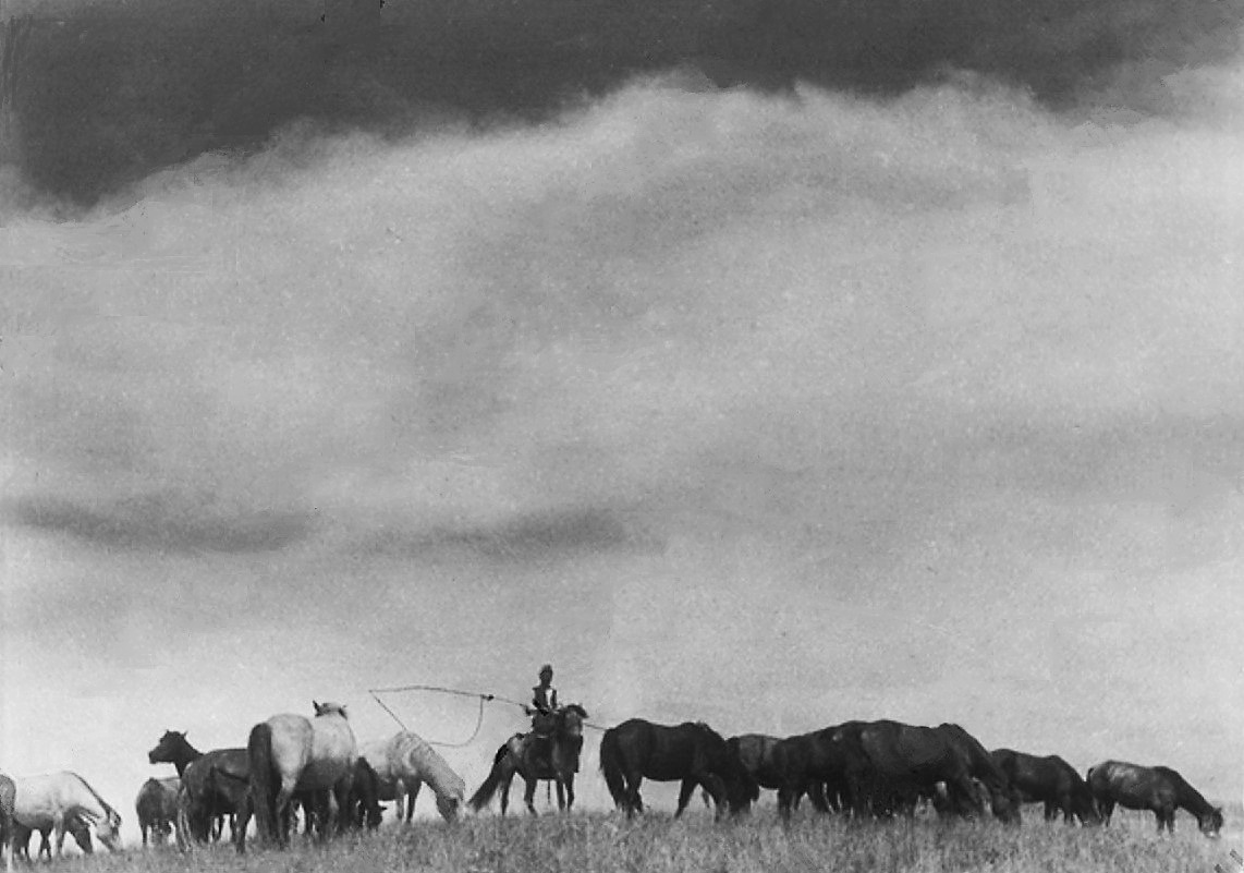 Животноводство в СССР. Стадо кобыл - источник кумысного лечения больных. Казахская ССР. Поселок Боровое